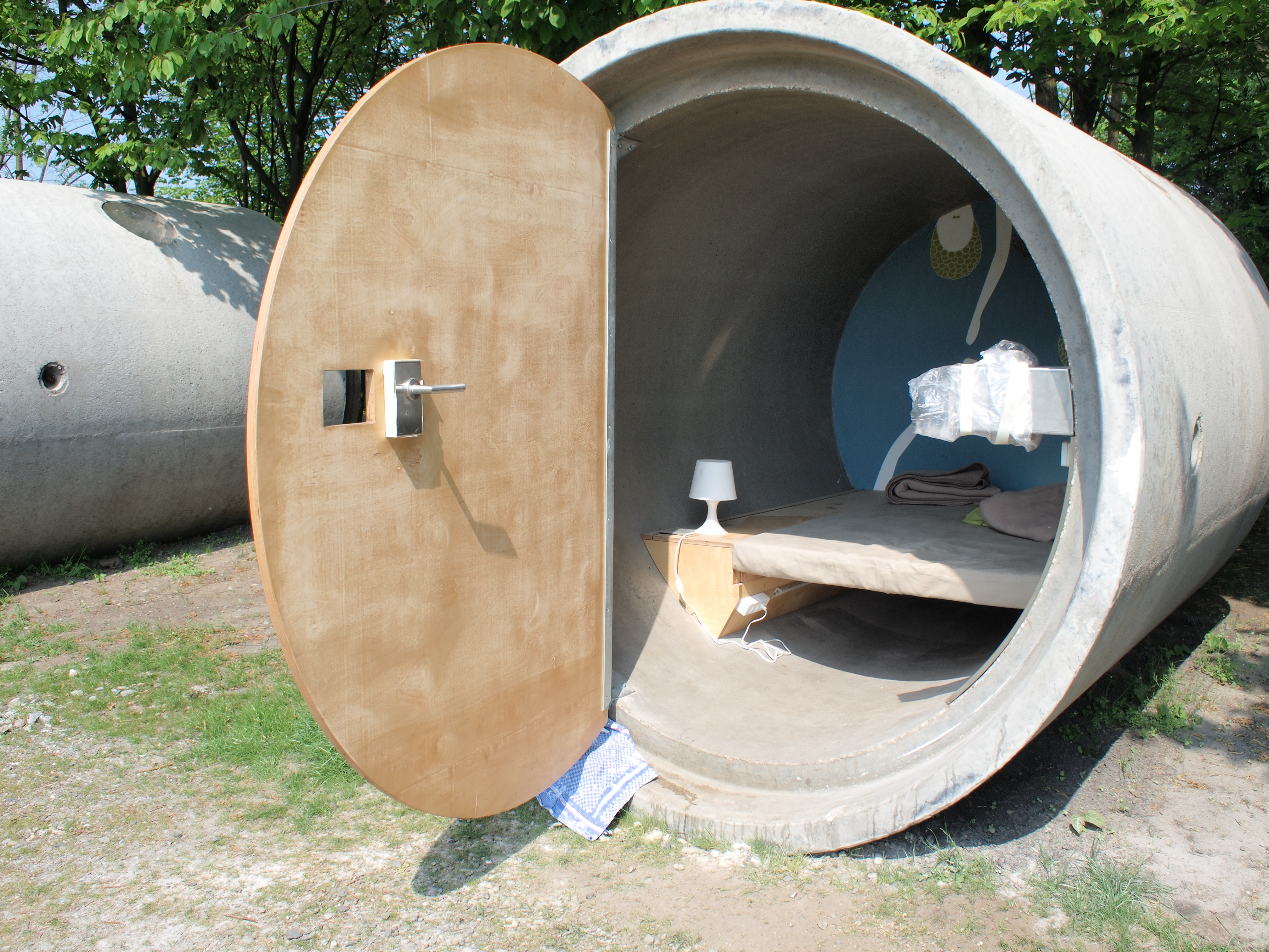 Bernepark Bottrop, Blick in eine Röhre des "Parkhotels" oberhalb des ehemaligen Klärbeckens, gestaltet von dem österreichischen Künstler Andreas Strauss